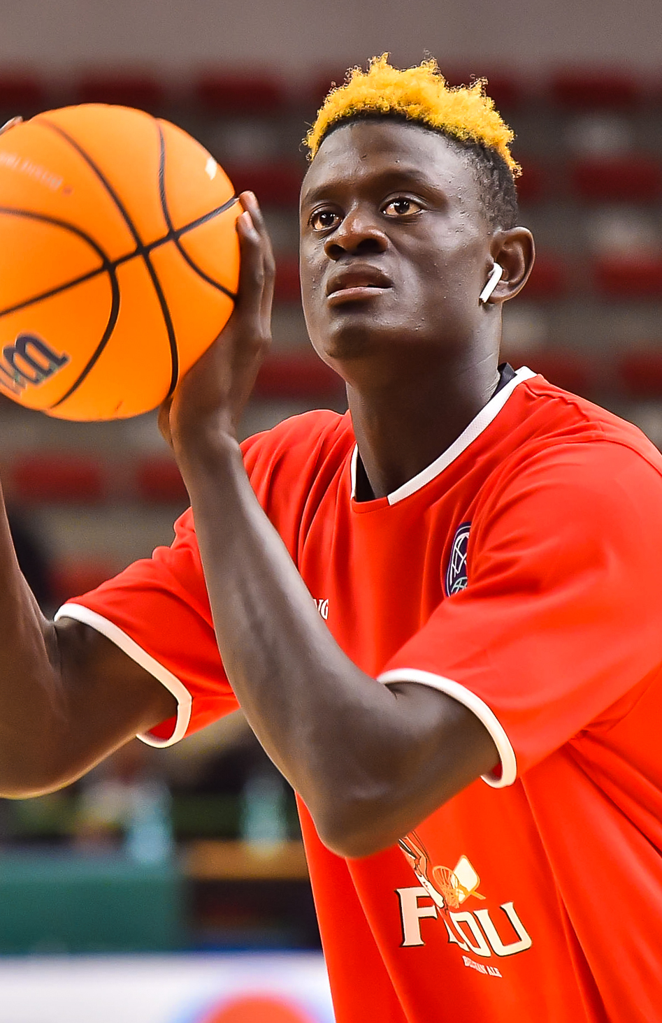 Amar Sylla